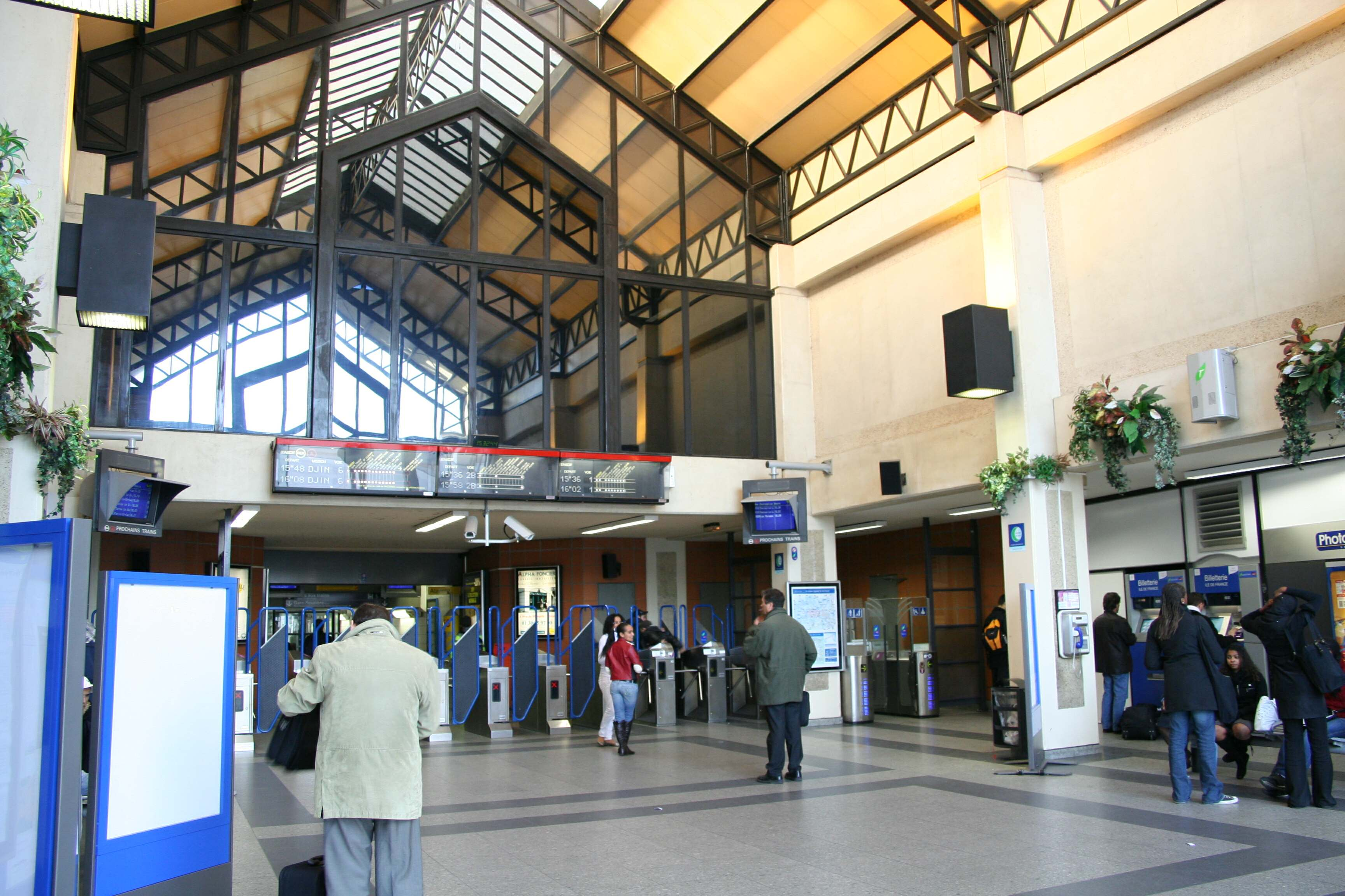 Gare de Poissy - Yvelines (France)